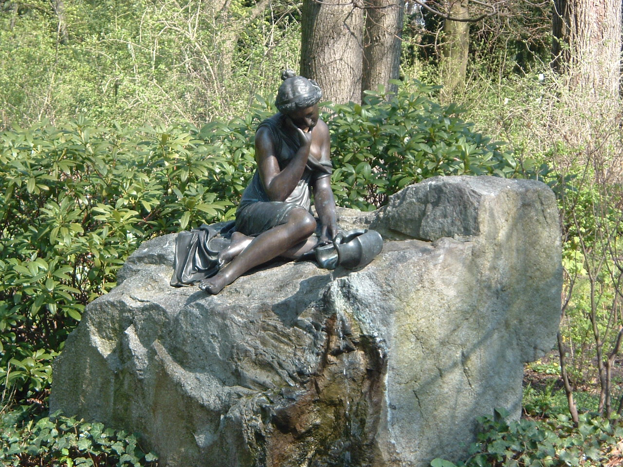 Das Milchmädchen von Pawel Petrowitsch Sokolow auf dem Gutshof von Schloss Britz